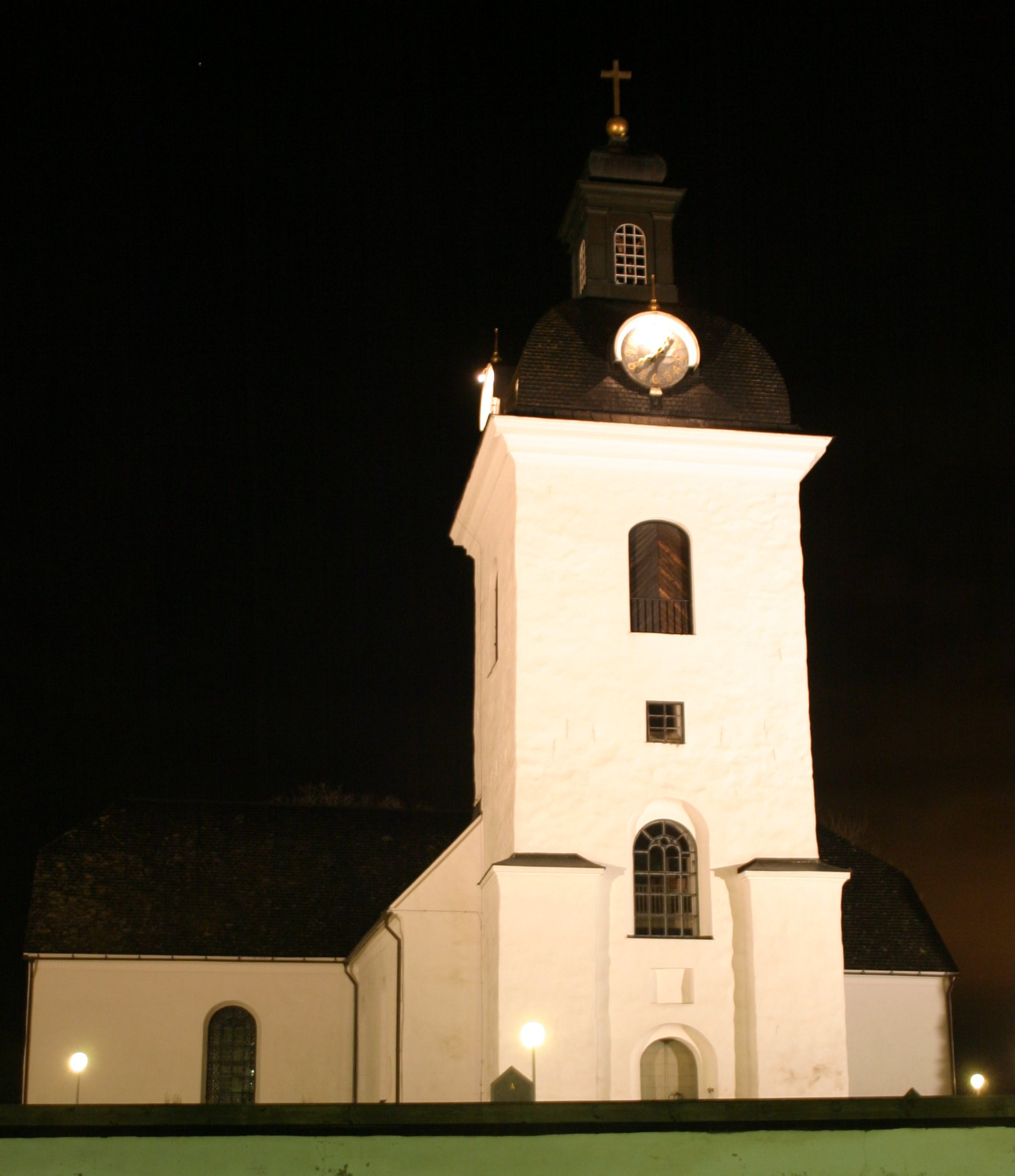 Bälinge kyrka (Uppland).